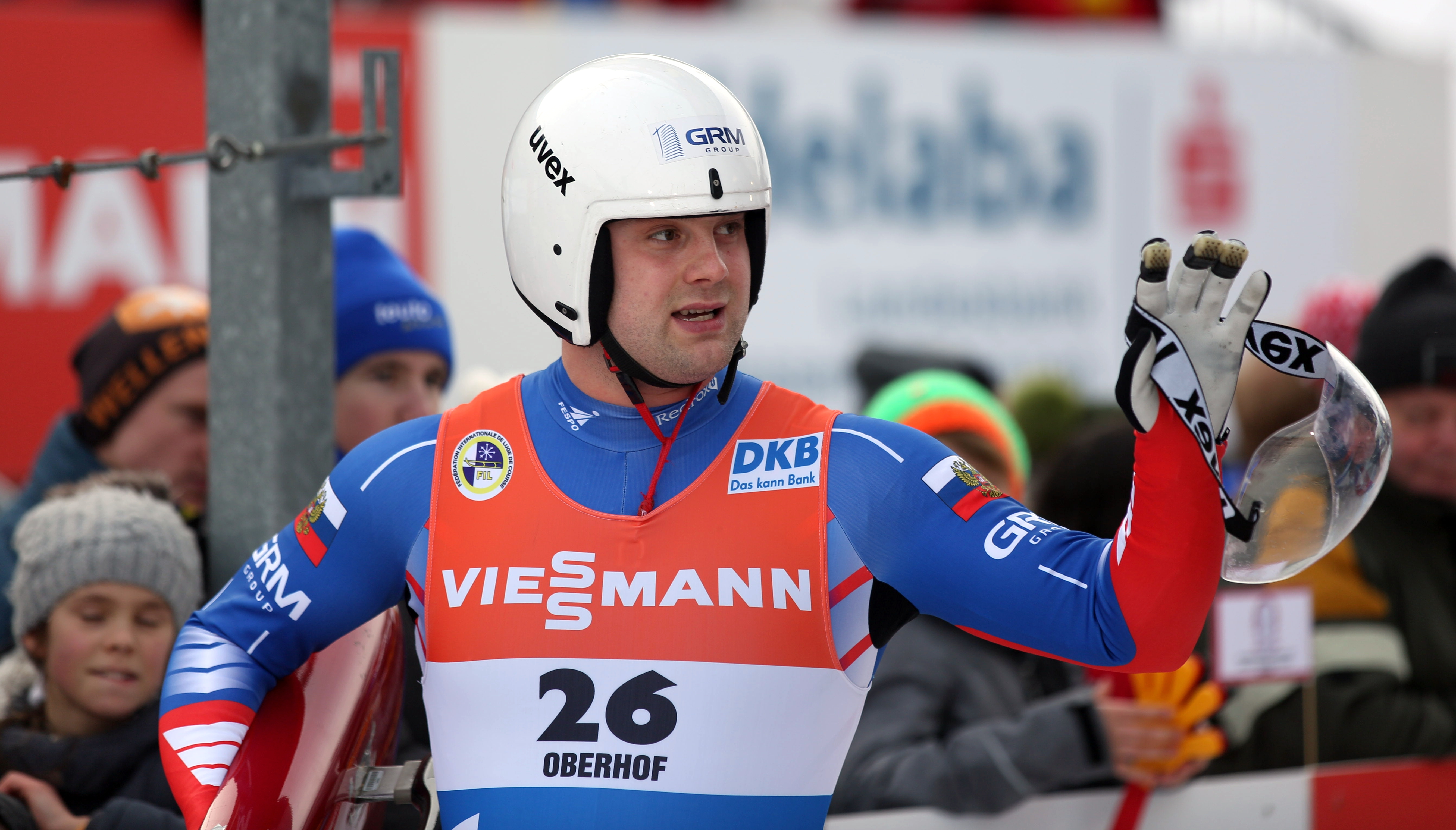 Semen Pavlichenko beim Rennrodel-Weltcup der Herren in Oberhof 2017